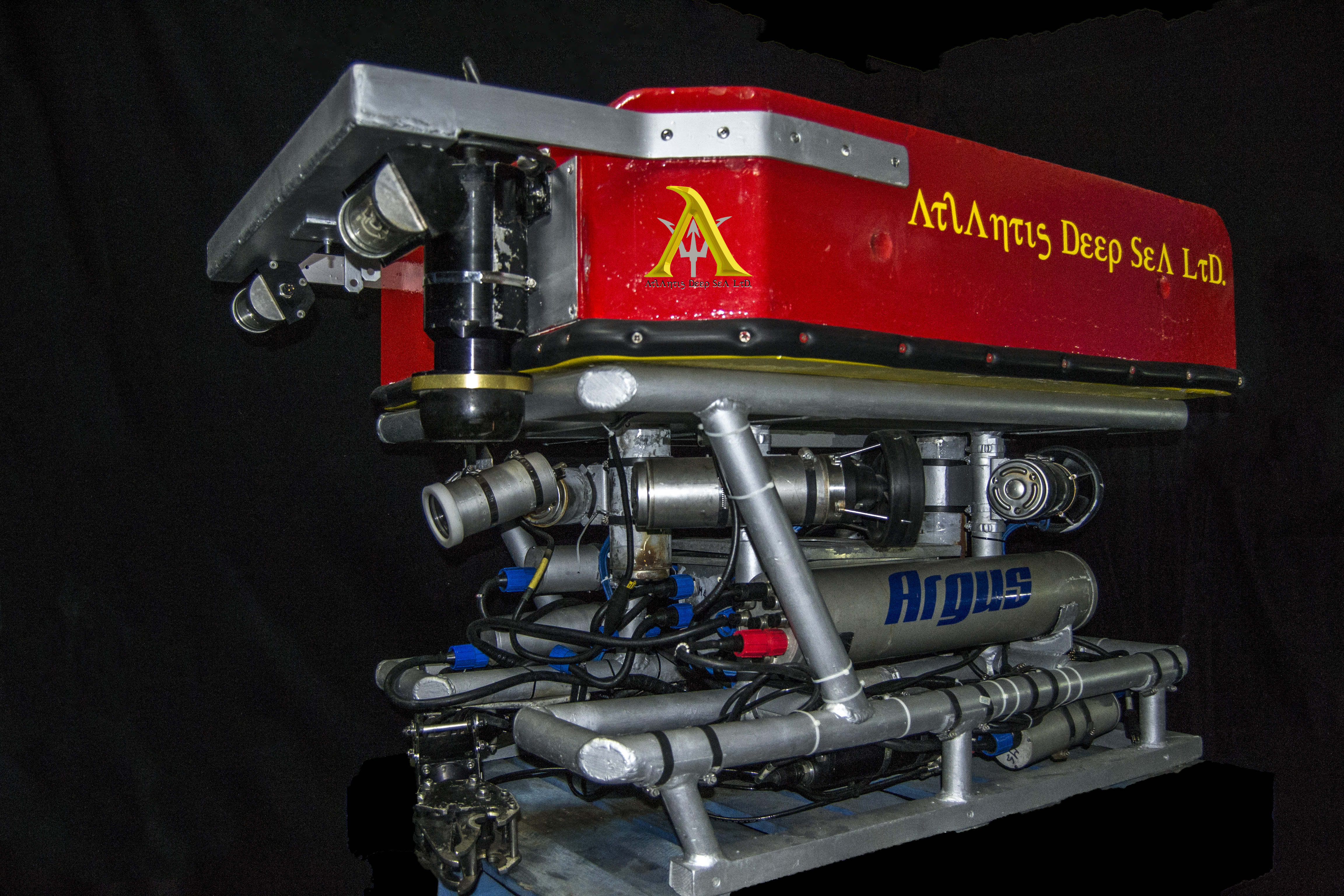 ROV classe II Osservazione